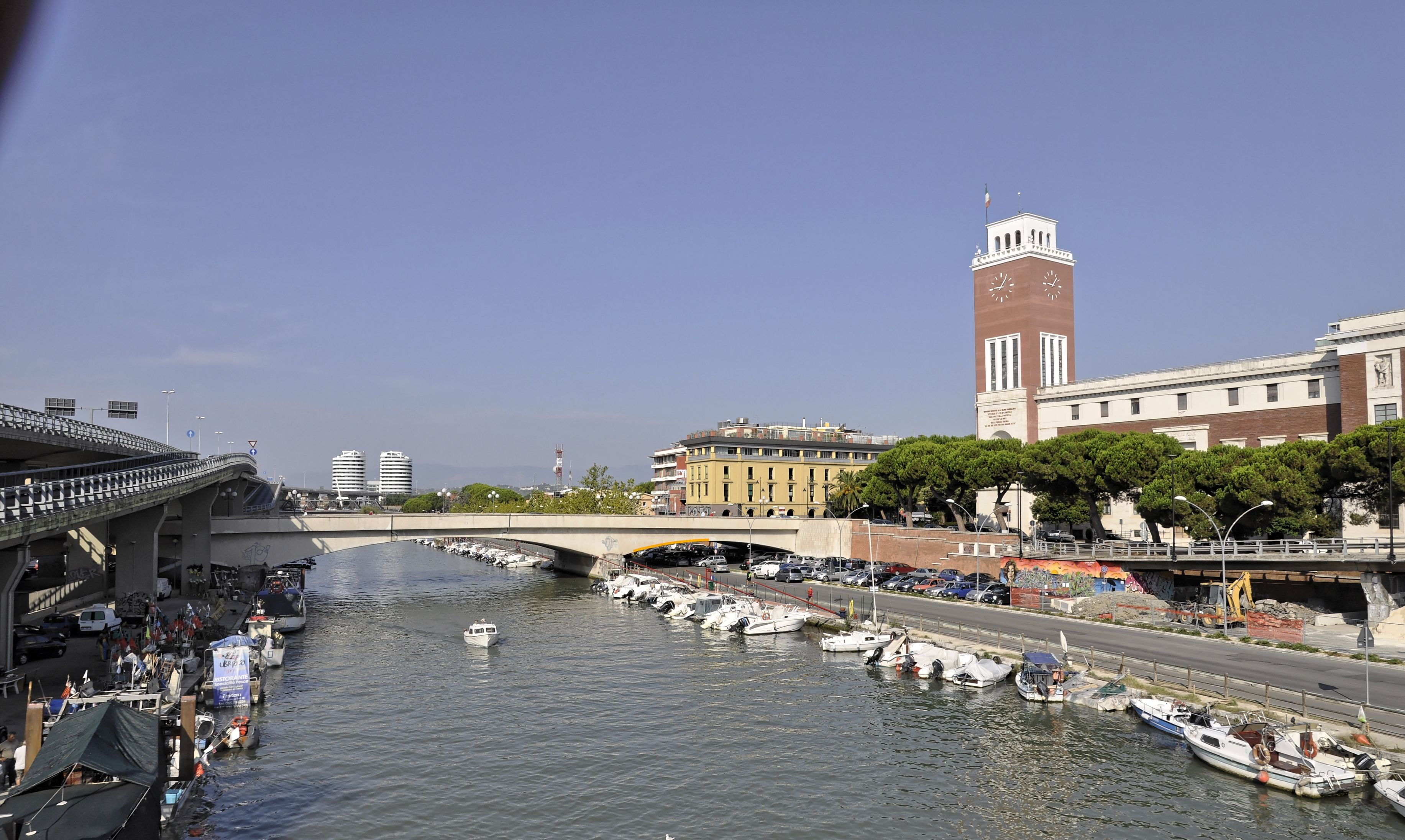 Pescara 2015